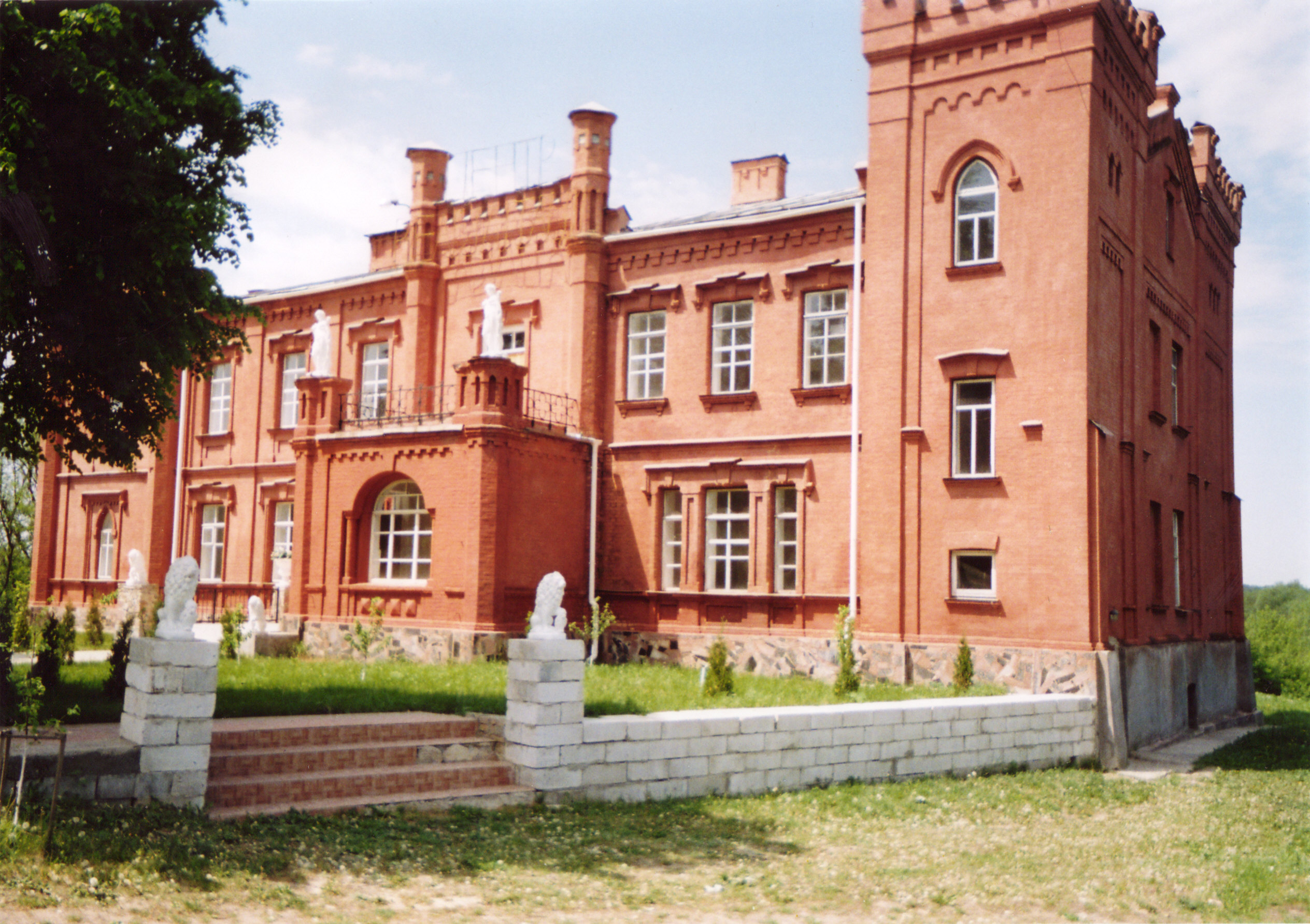 Палацо-парковий комплекс садиби Заботіних, Мала Ростівка, вул. Польова